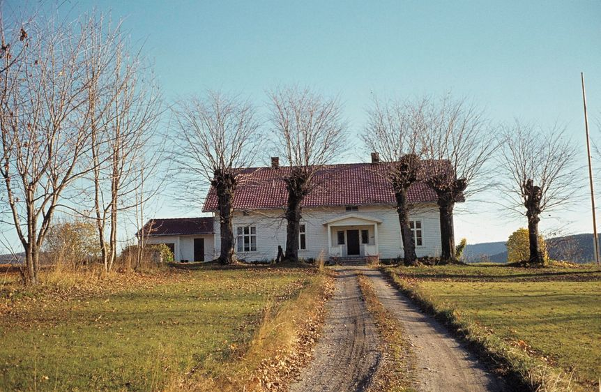 Hof prestegård, Holmestrand kommune, Vestfold